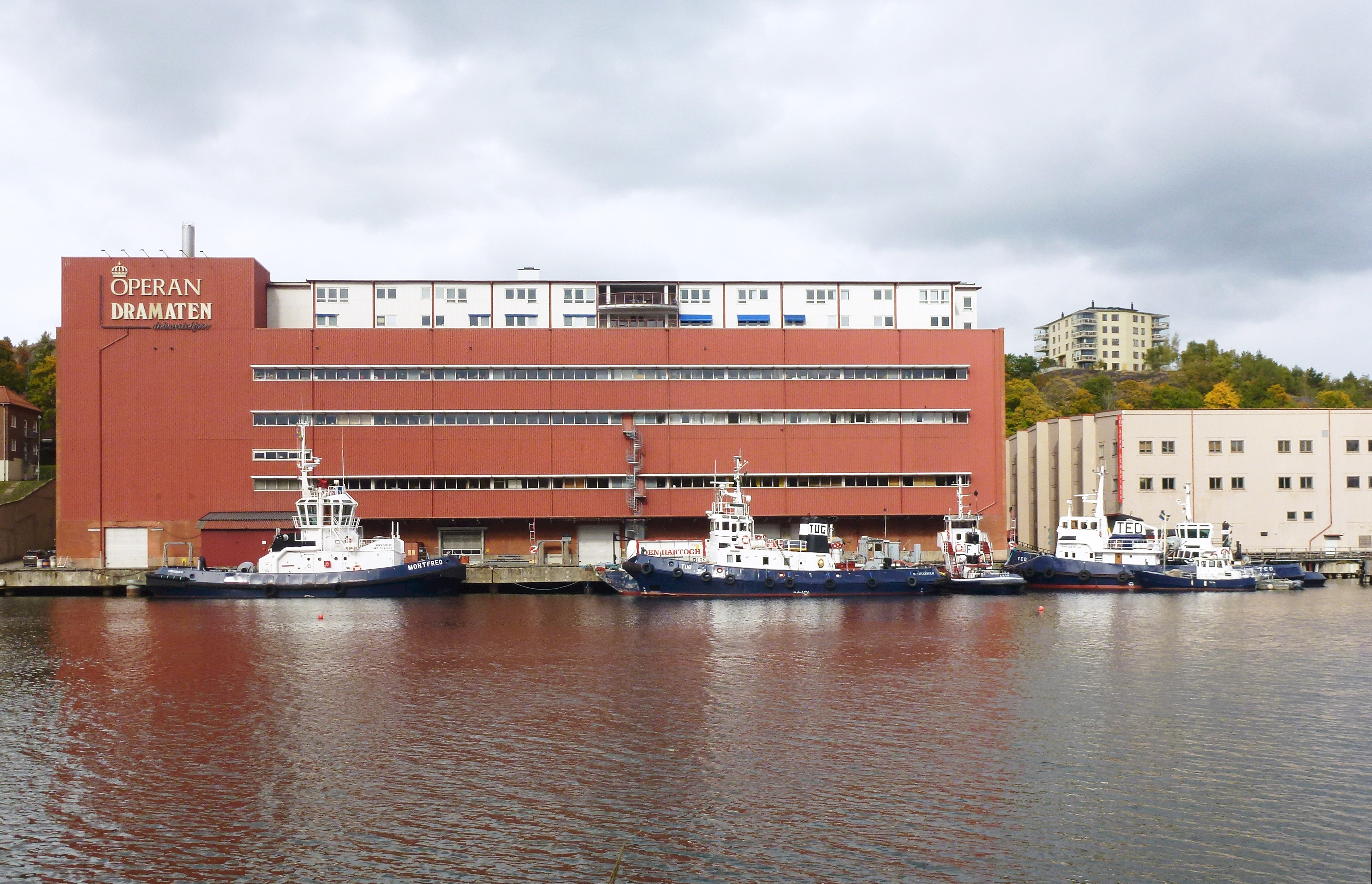 Operans och Dramatens dekorateljéer vid Gäddviken